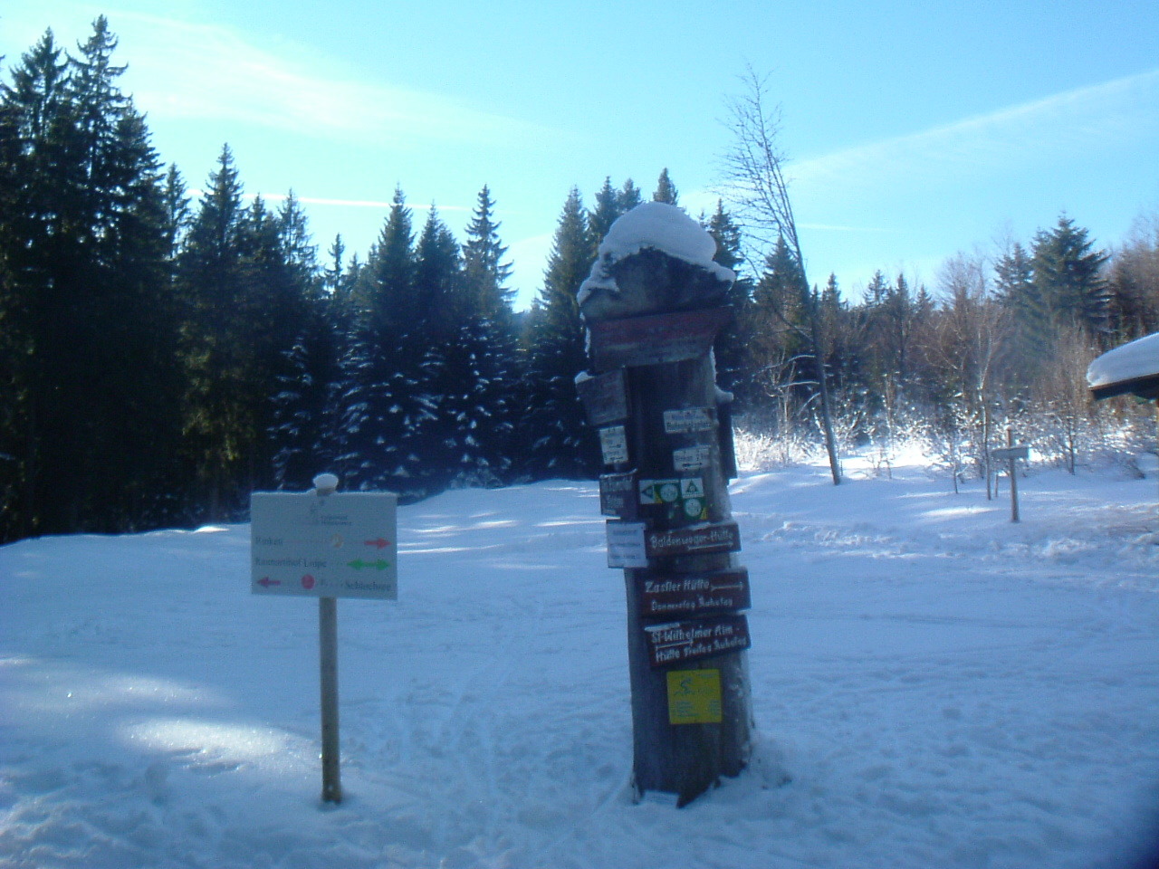 Am Rufenholzplatz